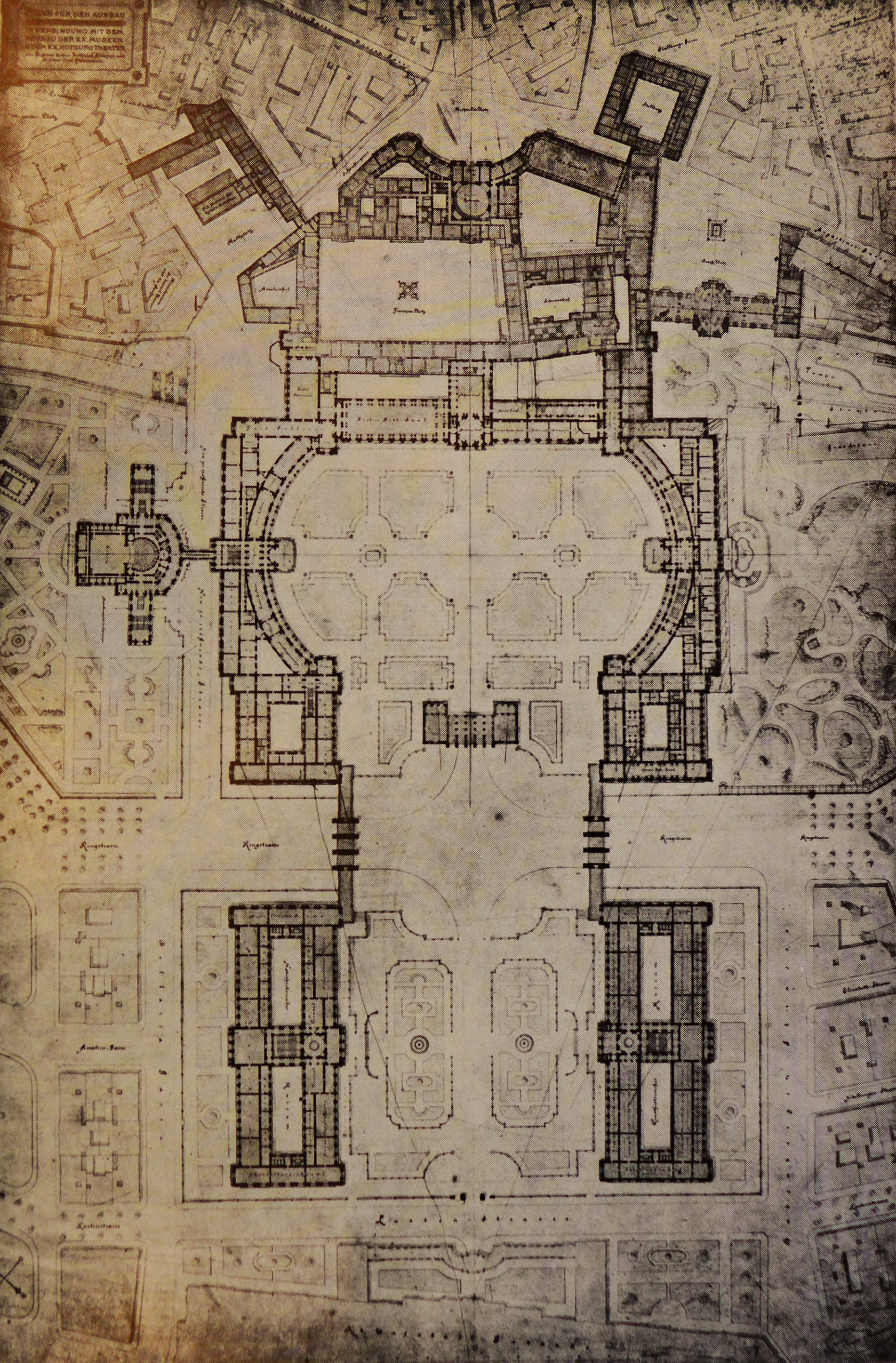 Gottfried Semper, Grundriss des Kaiserforums auf der Höhe der Beletagen, 20. Dezember 1869